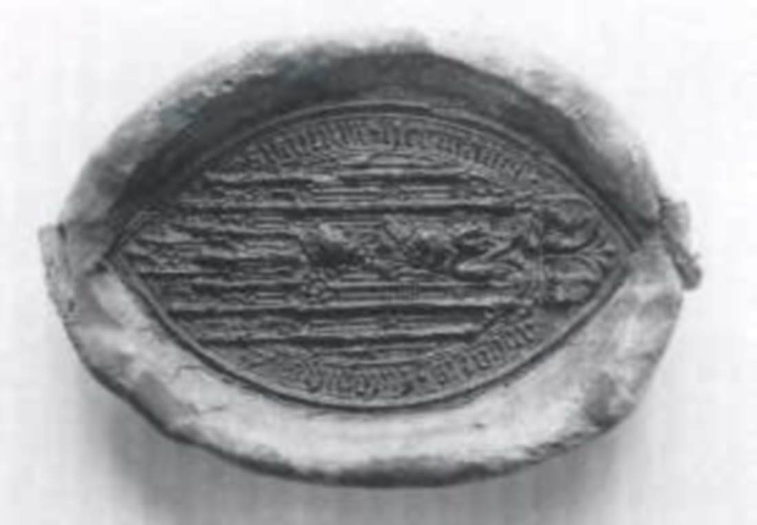 Siegel Hermann II. von Buchenau, Fürstabt von Fulda (1440-1449)